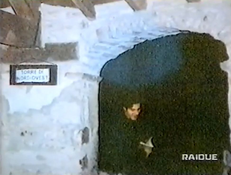 la prima foto in assoluto scattata del fantasma di Bardi ( aprile 1995 )